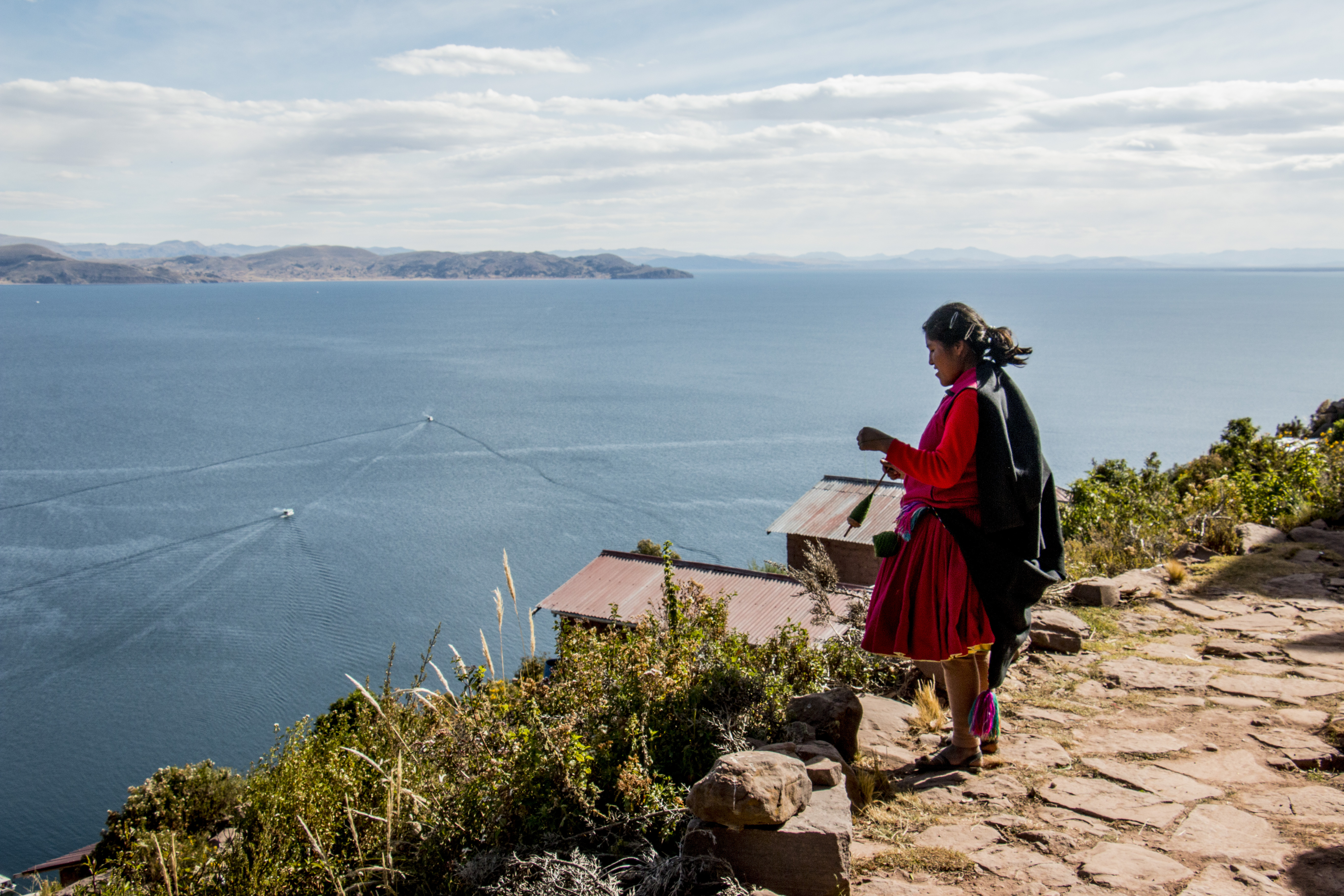 Una mujer local contempla las vistas en la isla de Taquile